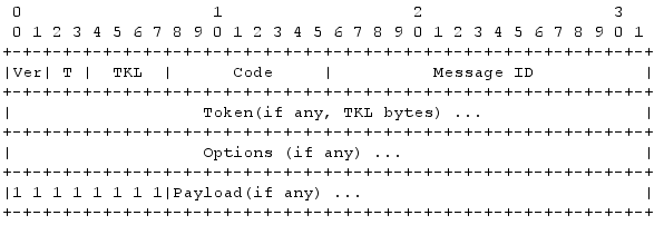 coap-header